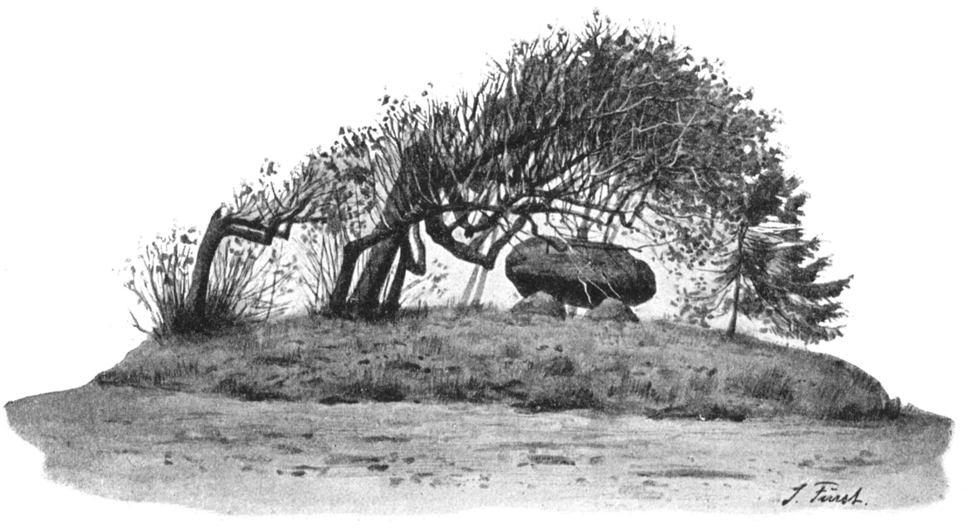 der Opferstein bei Albersdorf, Zeichnung von Julius Fürst um 1895